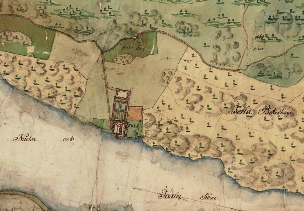 Arealavmätning för Järla gård